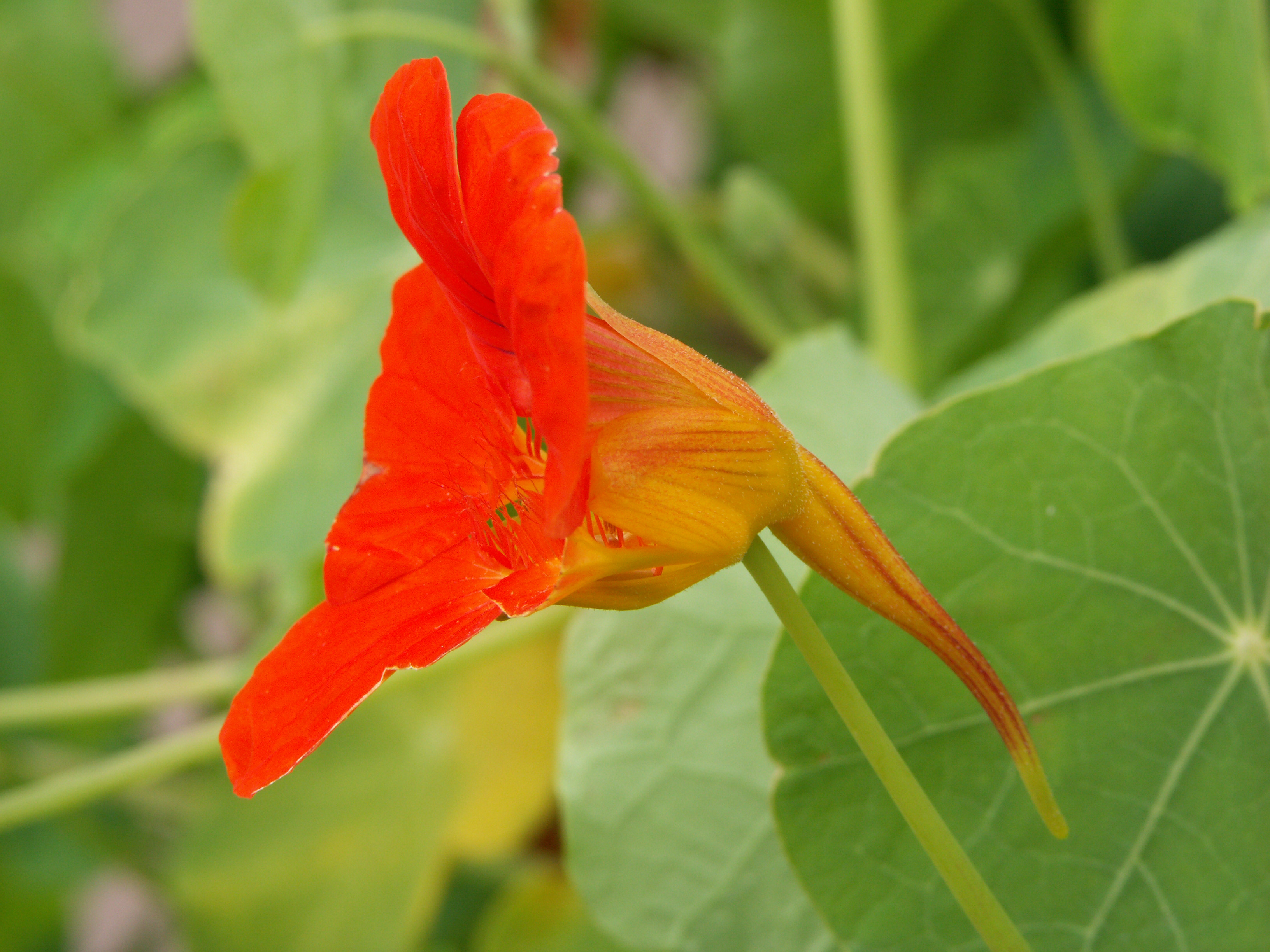 Kapuzinerkresse (Tropaeolum majus), Botanischer Garten, Berlin